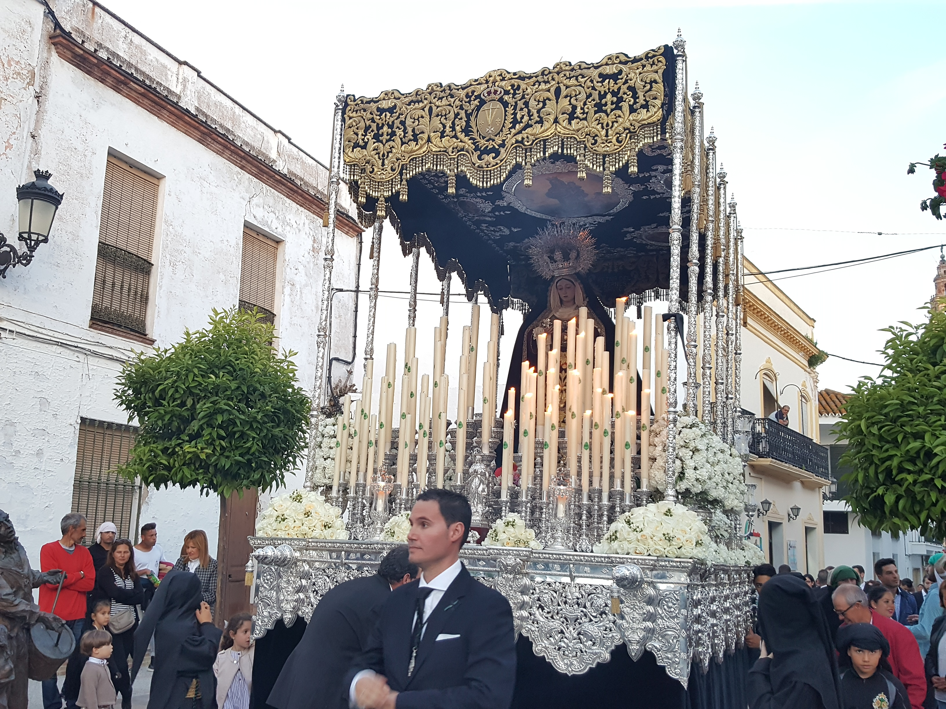 Hermandad del Cristo de la Vera-Cruz. Desfile procesional del Viernes Santo tarde. Vista de paso de la Virgen de la Soledad por el casco urbano de Moguer